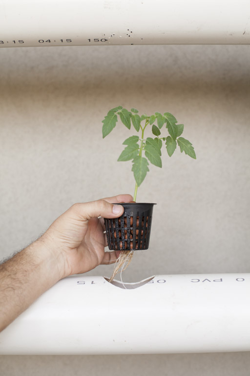 גידול עגבניות בשיטה ההידרופונית NFT